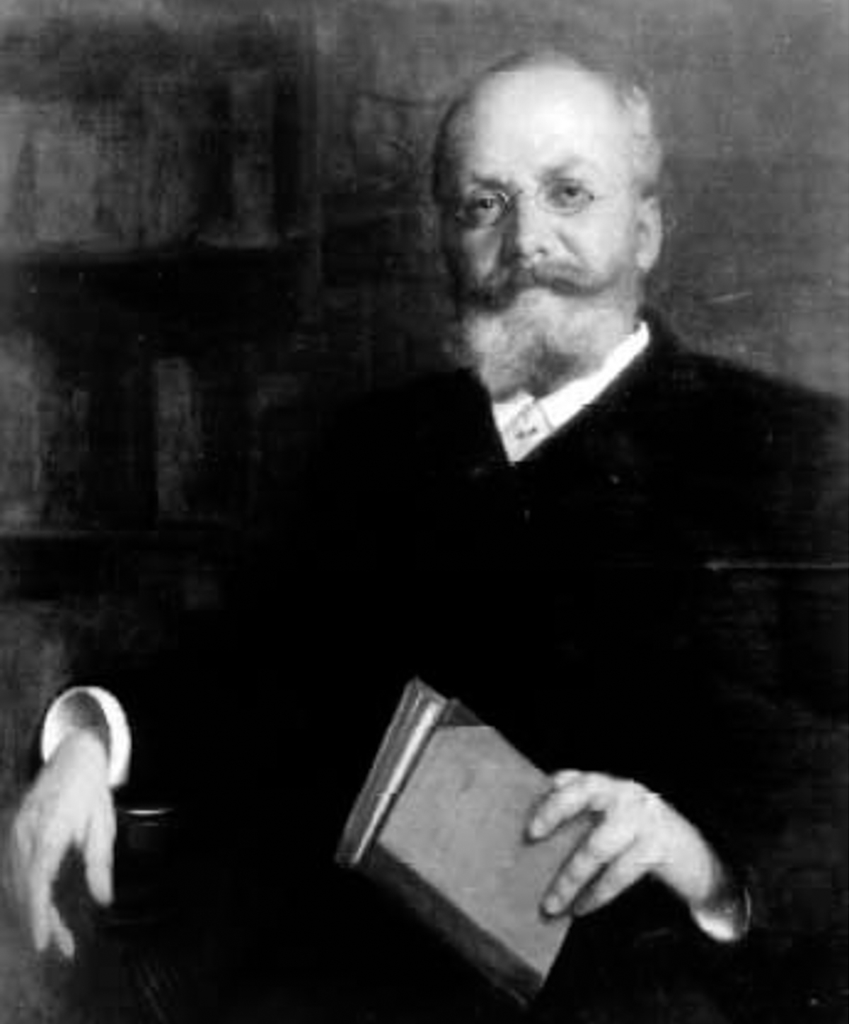 Harry Bresslau, né le 22 mars 1848 à Dannenberg,et mort le 27 octobre 1926 à Heidelberg, est un historien allemand, spécialiste de la diplomatique.